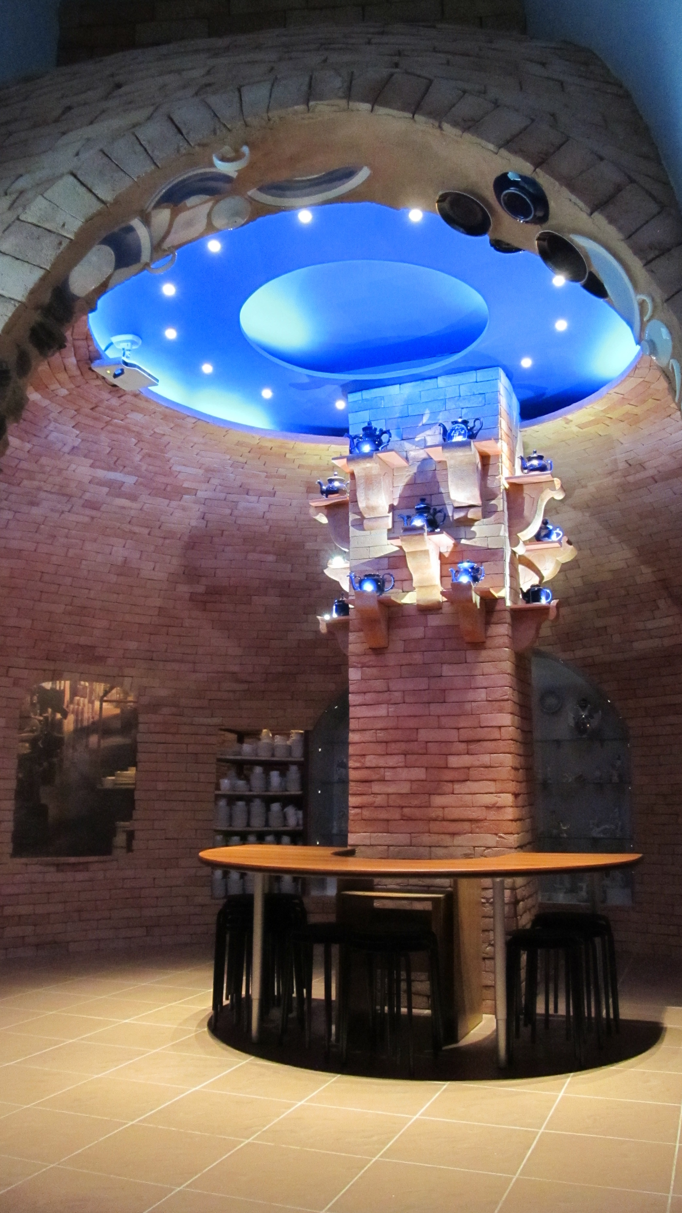 Зал экспозиции "Музейный цех фарфора"